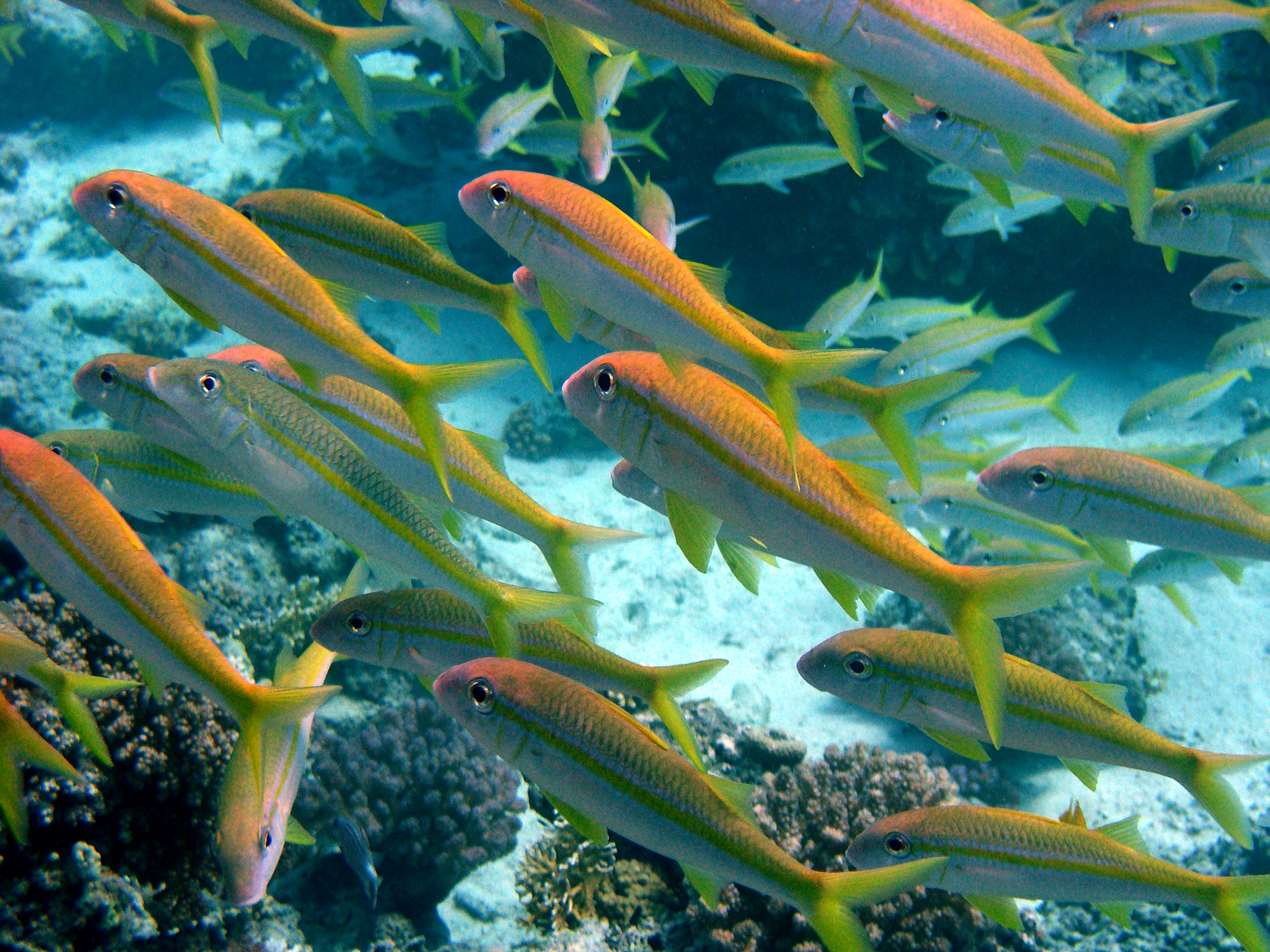 Mulloidichtys vanicolensis